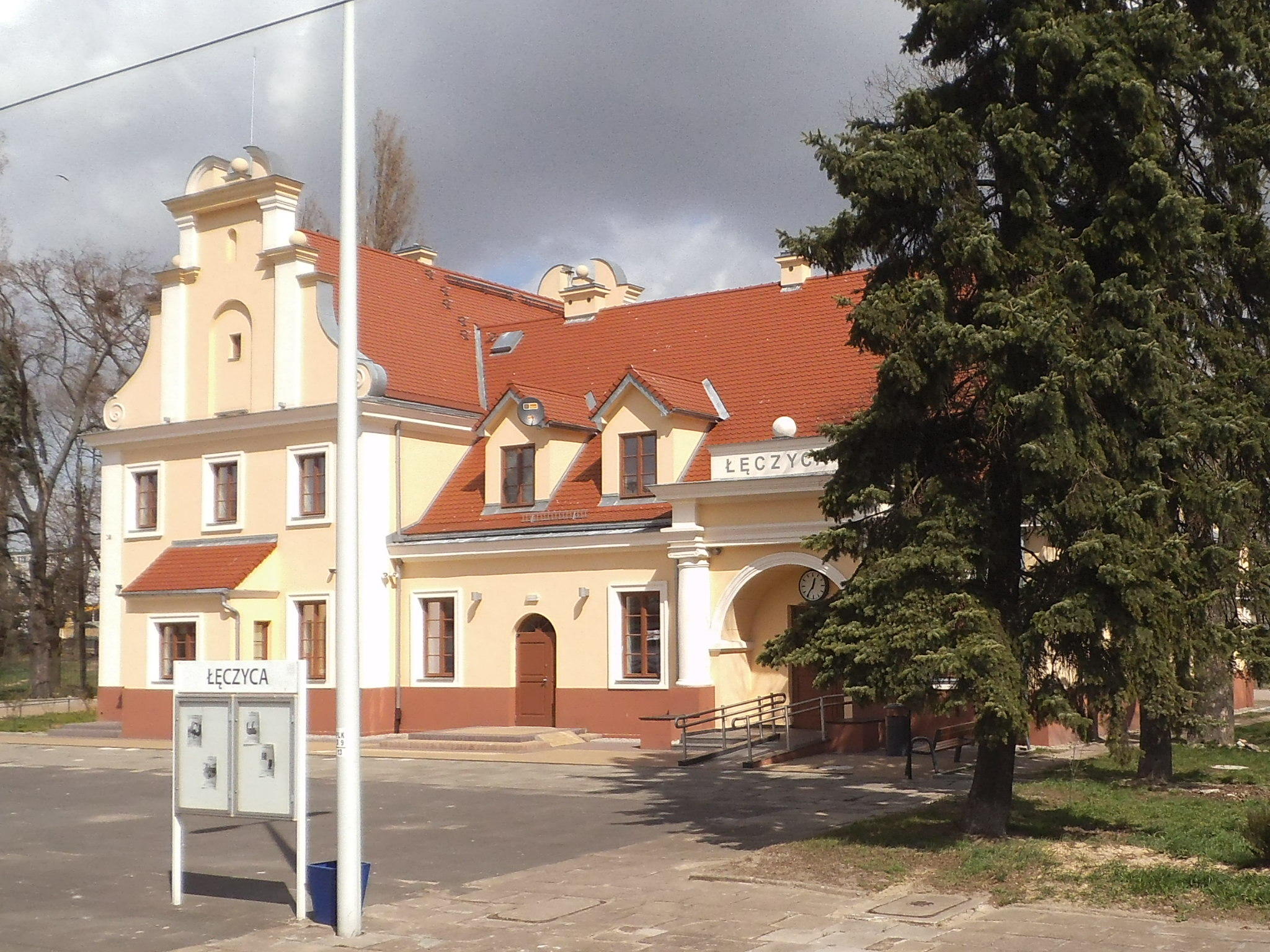 Łęczyca (stacja kolejowa)5